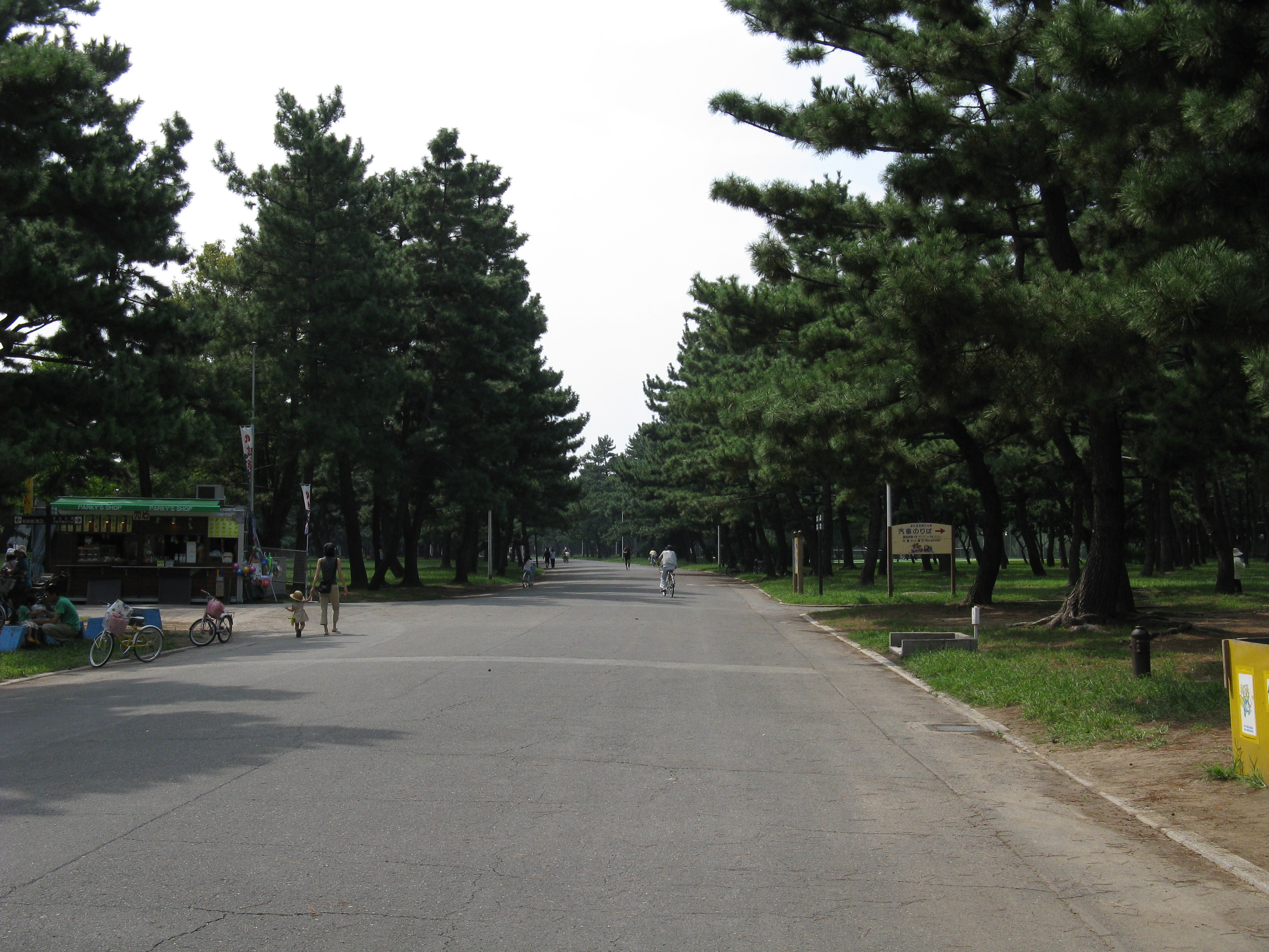 浜寺公園